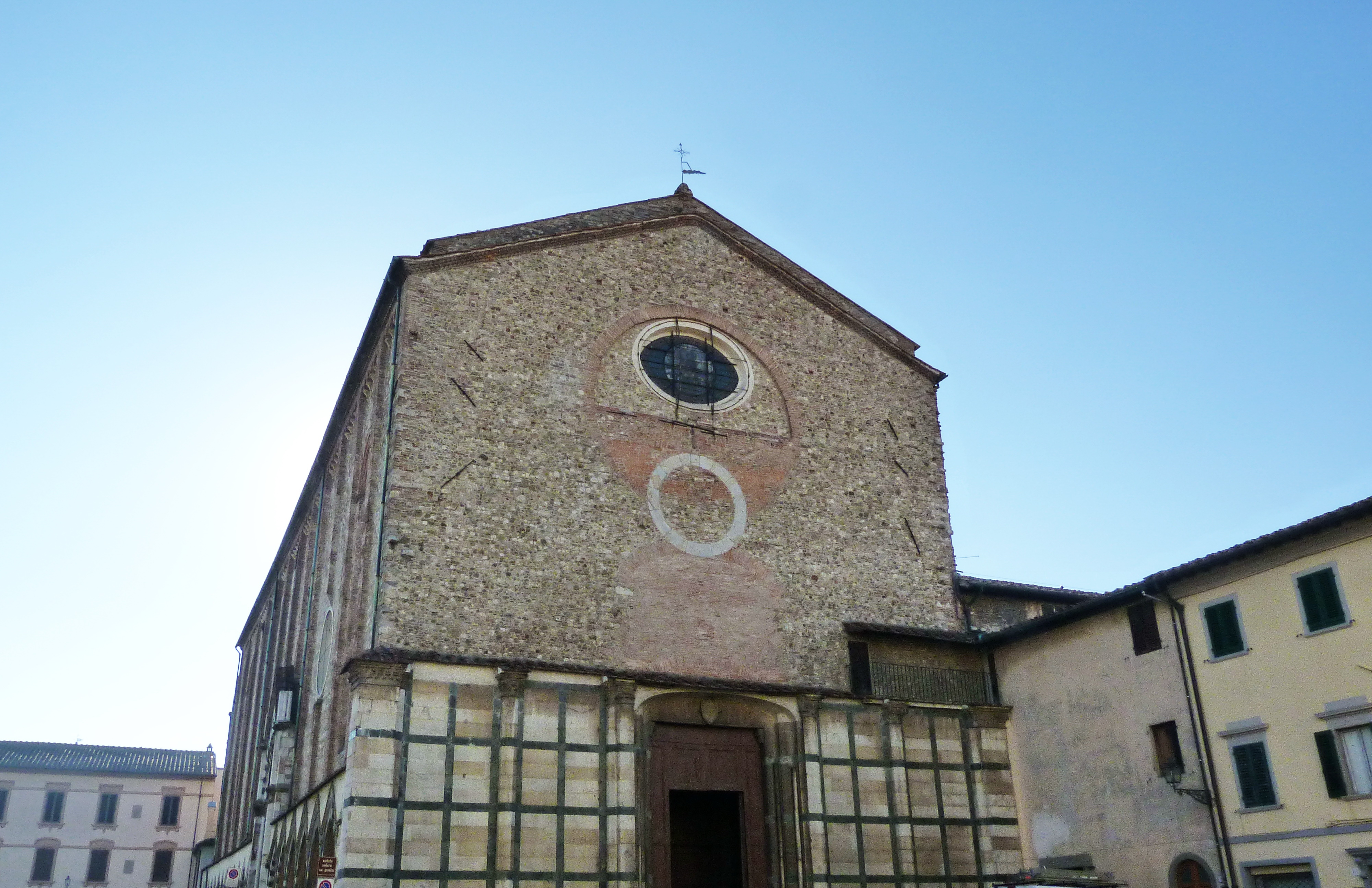 Chiesa di San Domenico, Piazza San Domenico, Prato, Toscana, Italia This is a photo of a monument which is part of cultural heritage of Italy.